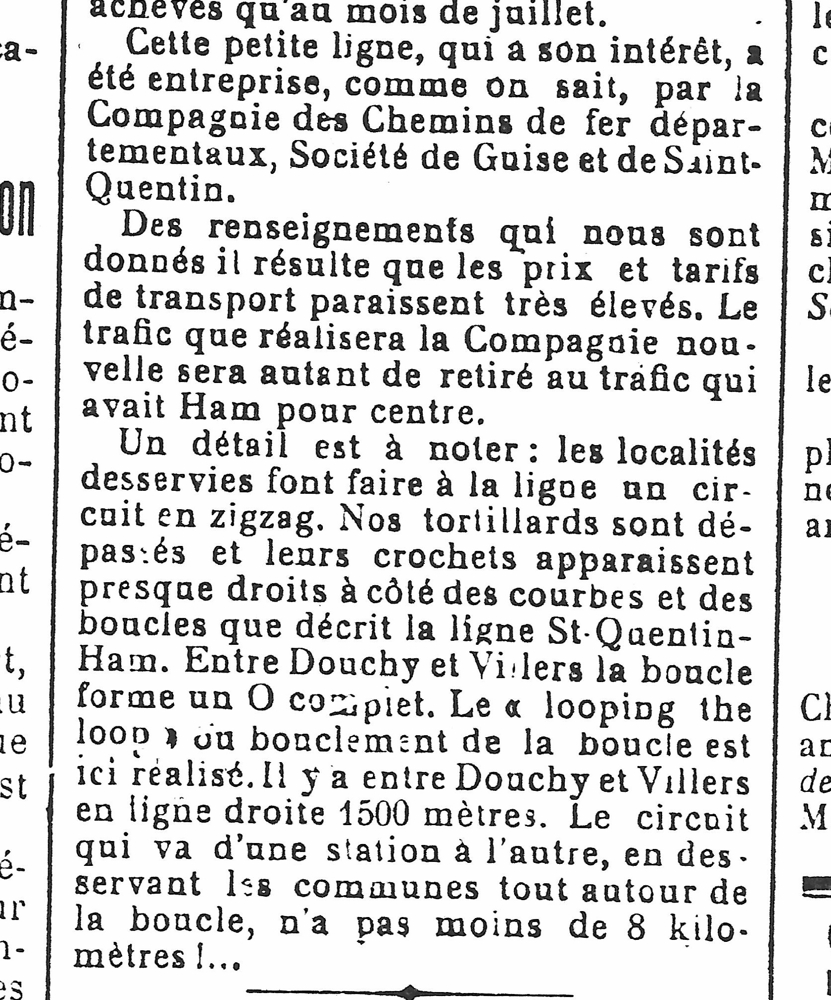 Article journal 2è partie